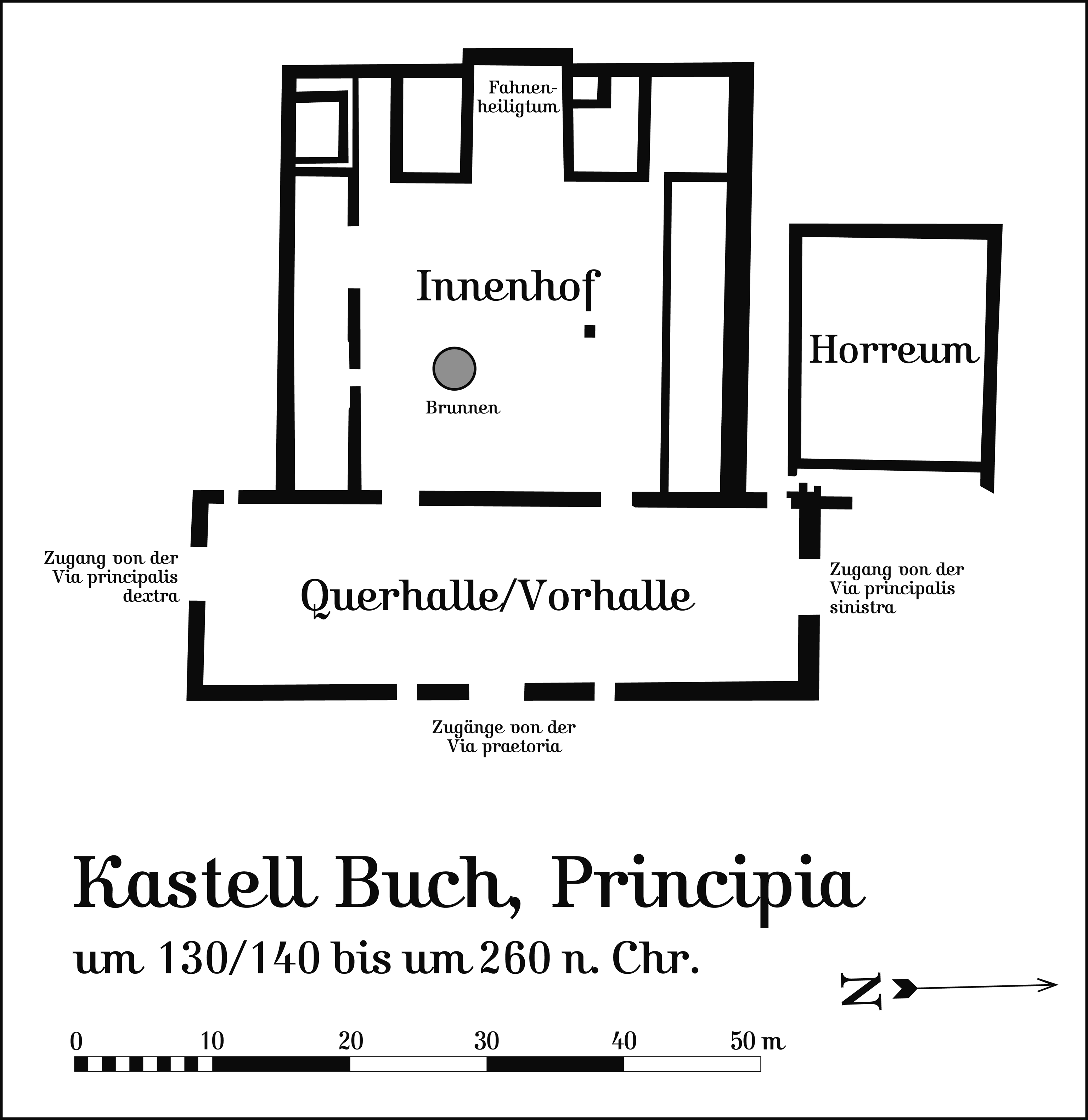 Principia im limesnahen Kastell Buch, Baden-Württemberg. Hergestellt am Macintosh unter Macromedia Freehand MX; abgespeichert für Wikipedia unter Adobe Photoshop CS 2.